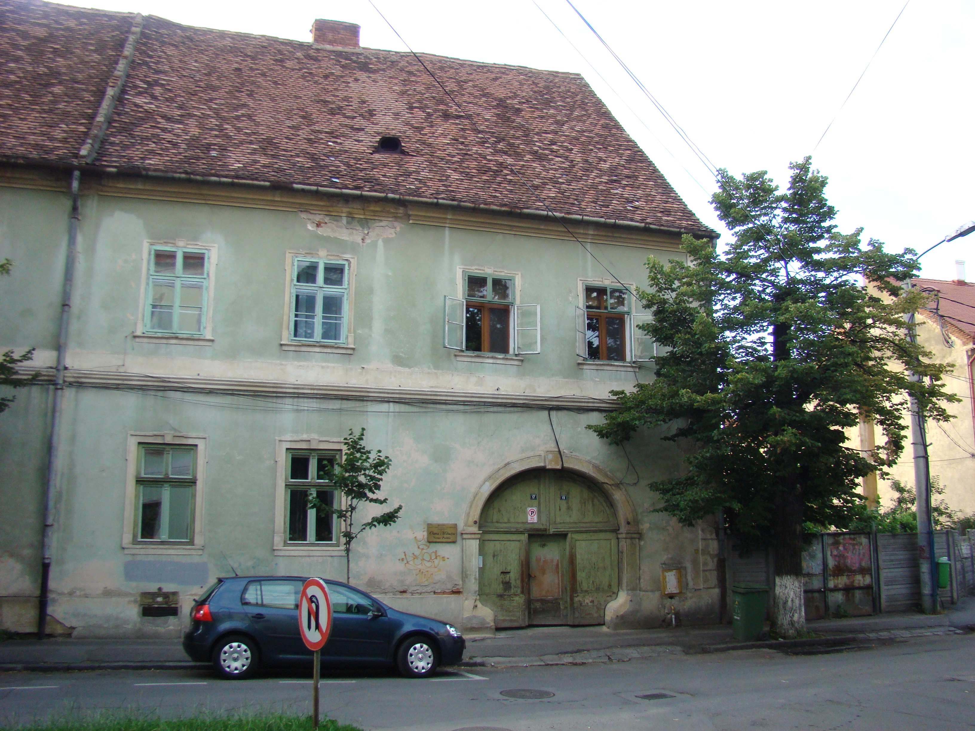 Clădire monument istoric, str. Mihail Kogălniceanu, nr.19 04